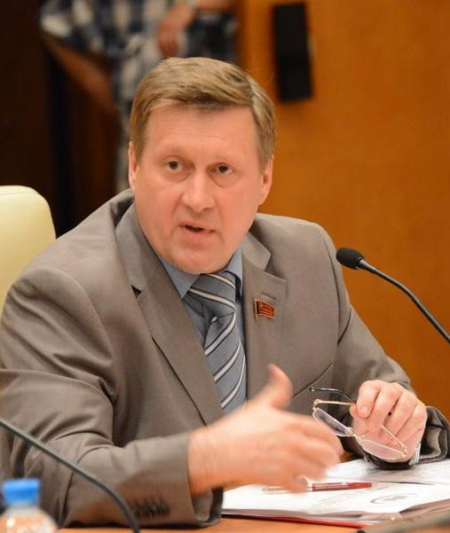 В Госдуме ФС РФ